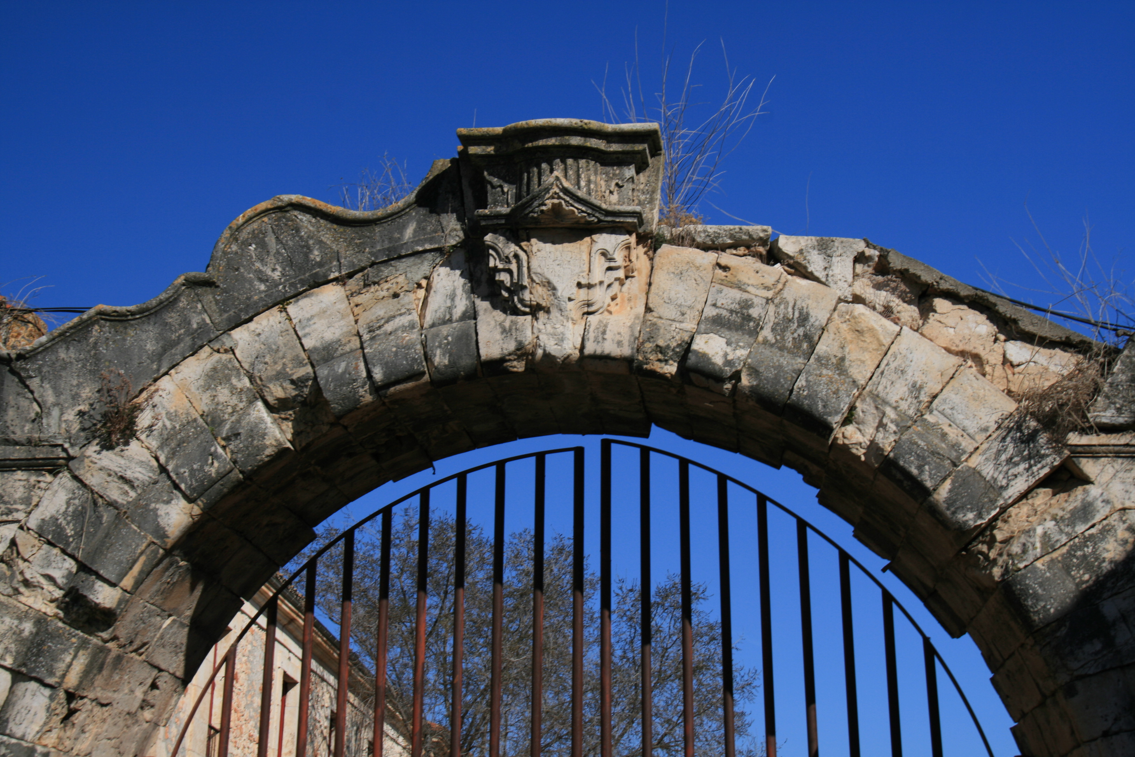 Arco de acceso a la Plaza de Fiestas